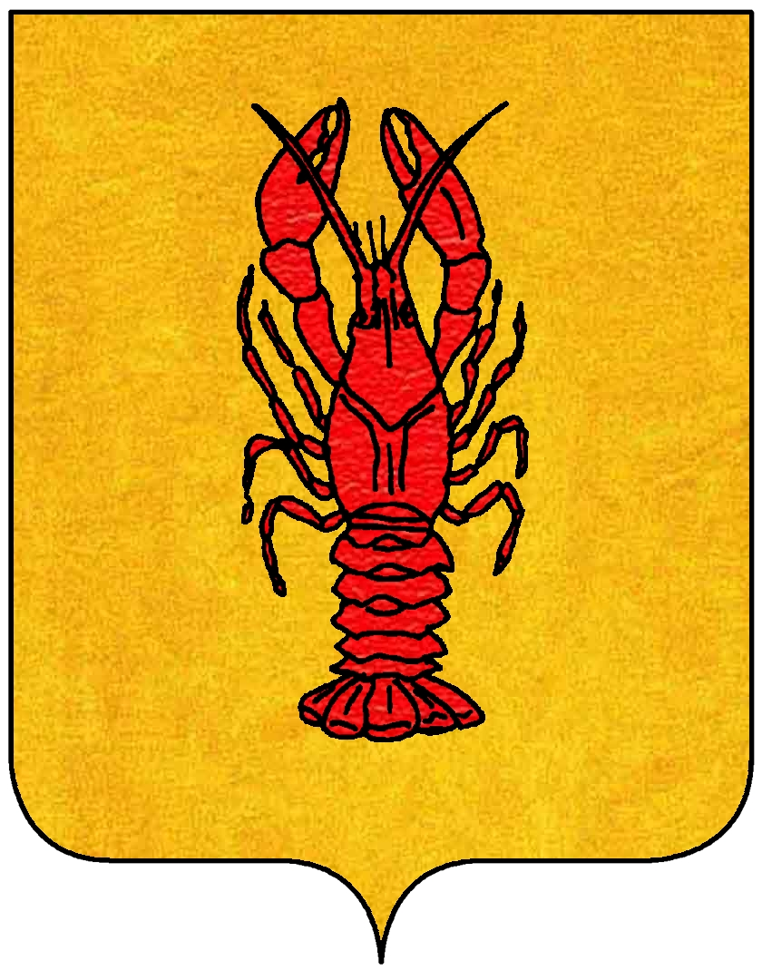 Stemma della famiglia Gambarelli